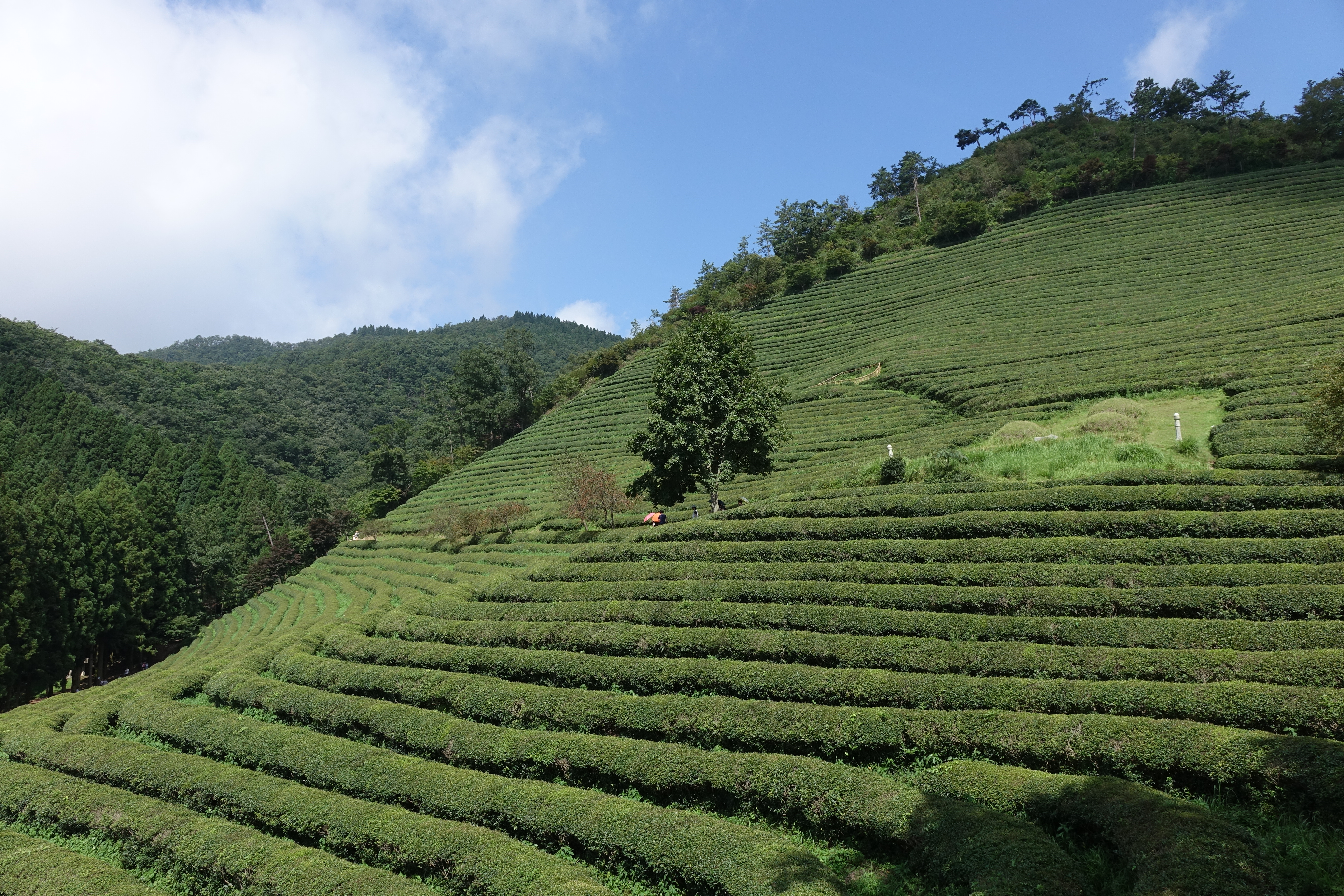 2015년 8월 대한다원 (전라남도 보성군)